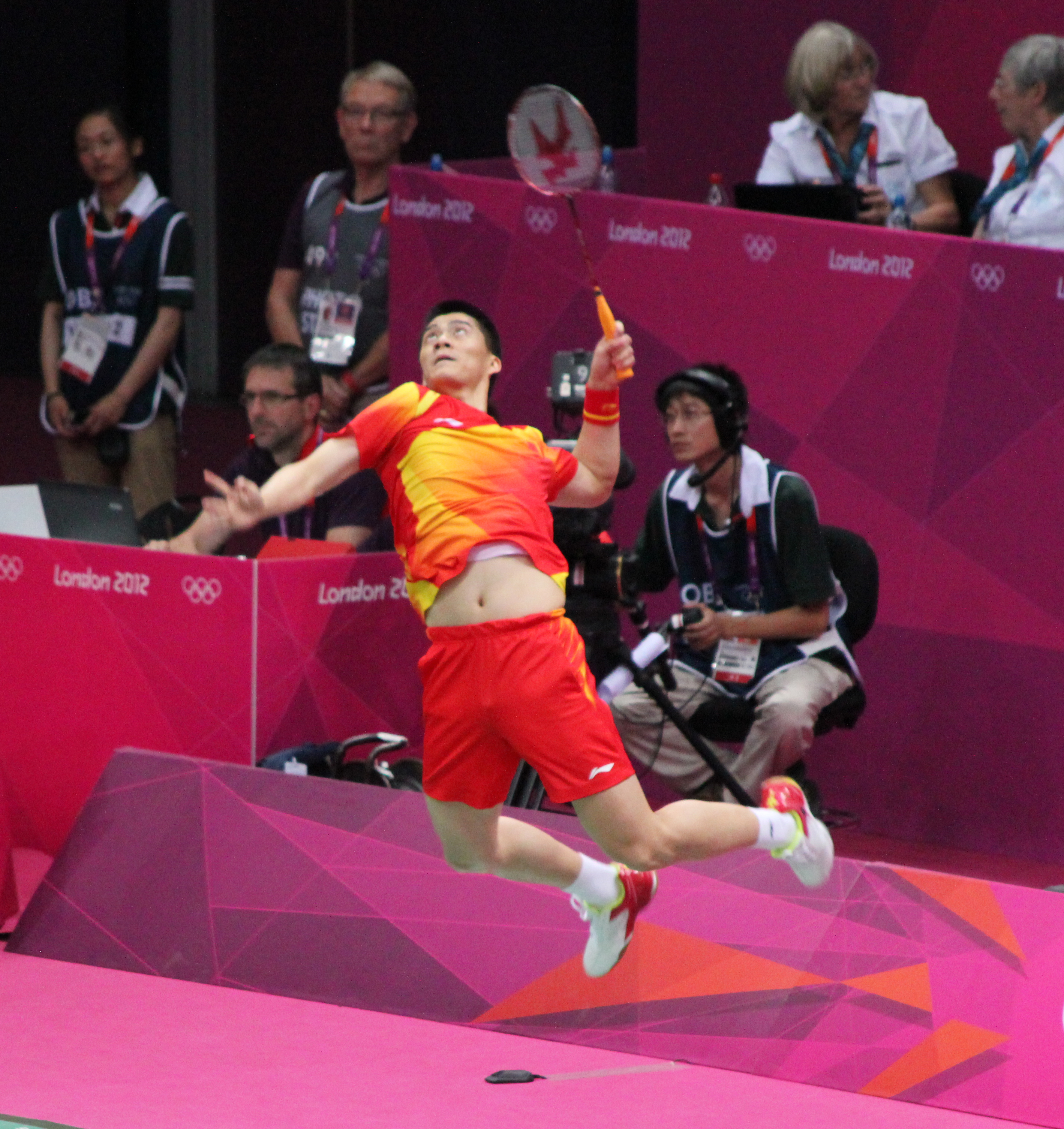 Fu Haifeng, Men's Doubles Badminton Final